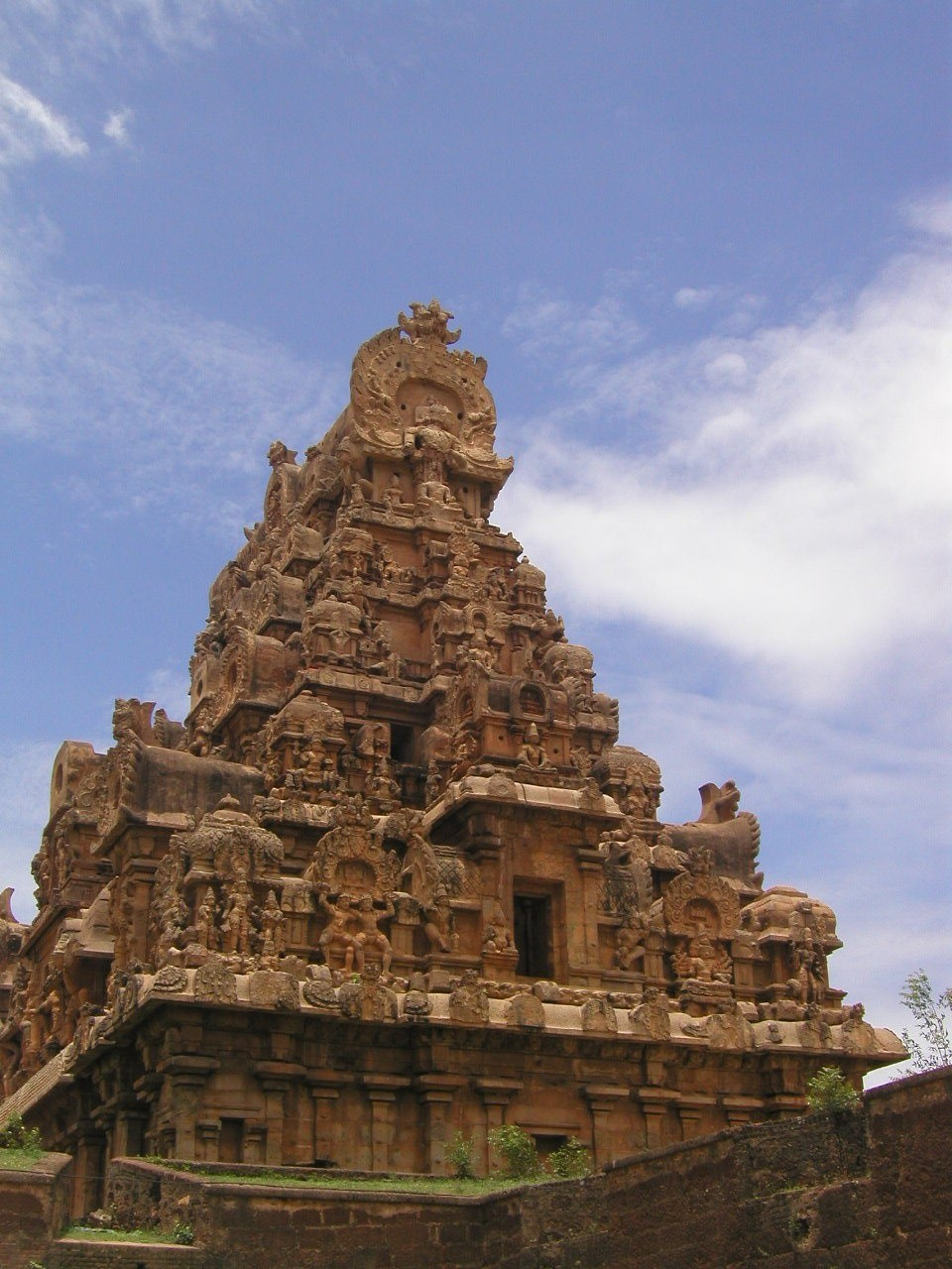 Brihadeeswarar Temple in Thanjavur